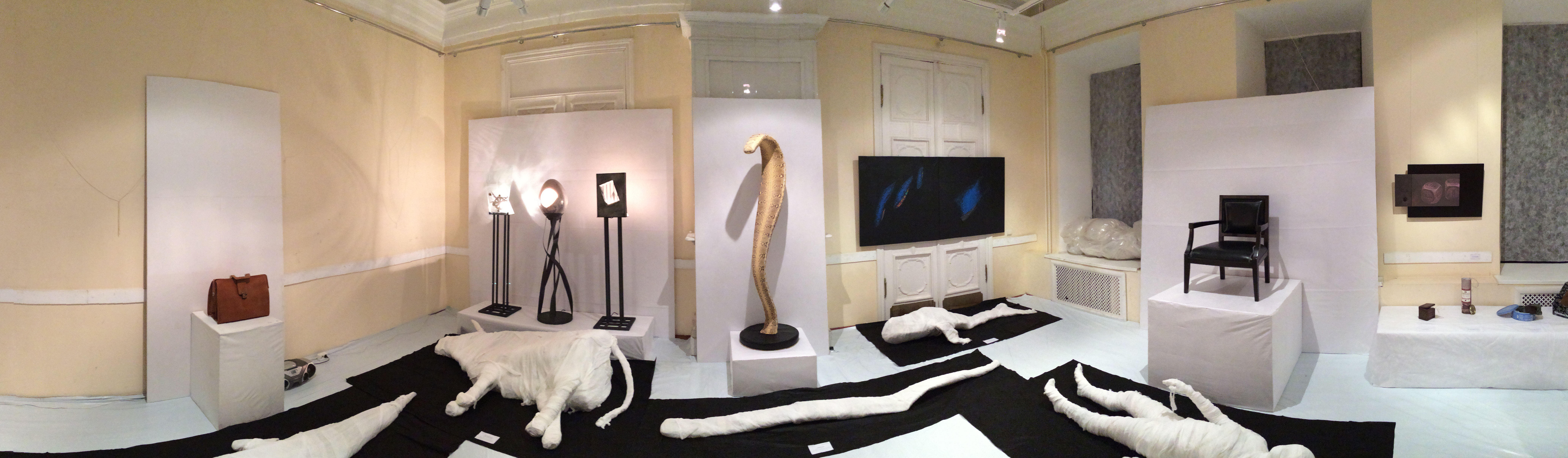 БИОДИФФУЗИЯ. Инсталляция. Кожа, металл, дерево, плёнка, бинты; авторские мебель, муляжи, светильники; уникальные предметы, бренд